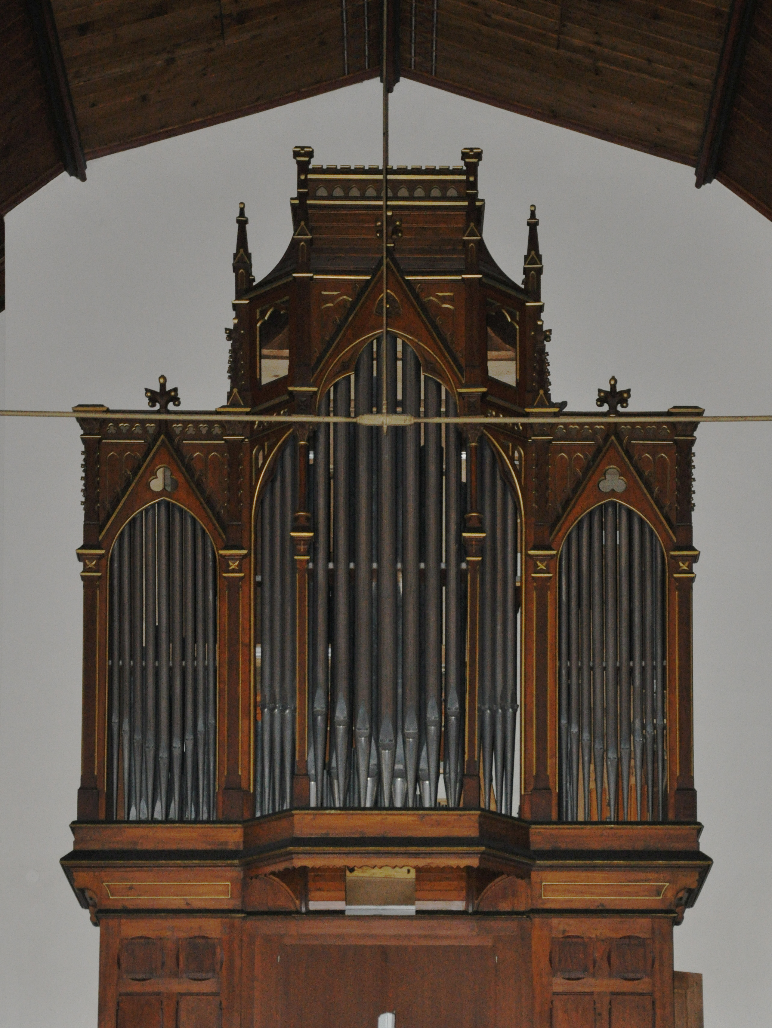 Wangen im Allgäu, Evangelische Stadtkirche